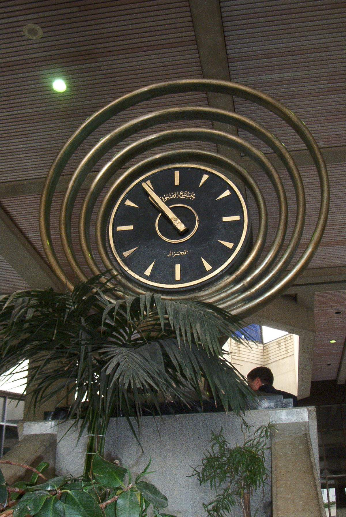 oeuvre de B. Yellès